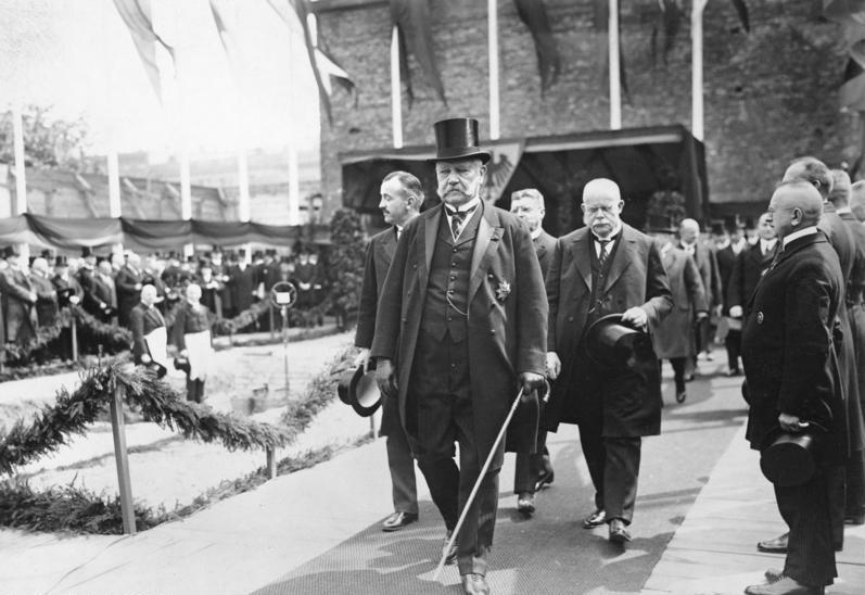 Grundsteinlegung der Reichskanzlei. Heute Mittag fand neben der alten Reichskanzlei in Anwesenheit des Reichspräsidenten die Feier der Grundsteinlegung für den Erweiterungsbau der Reichskanzlei statt. Der Reichspräsident verlas die für den Grundstein vollzogene Urkunde, anschliessend hielt der Reichskanzler eine Ansprache. An der Feier nahmen alle in Berlin anwesenden Reichs- und Staatsminister sowie sämtliche Vertreter des Reichsrates und andere hochstehenden Persönlichkeiten teil. Der Reichspräsident, dahinter Reichskanzler Dr. Marx und Staatssektretär Pünter begeben sich zur Feier.